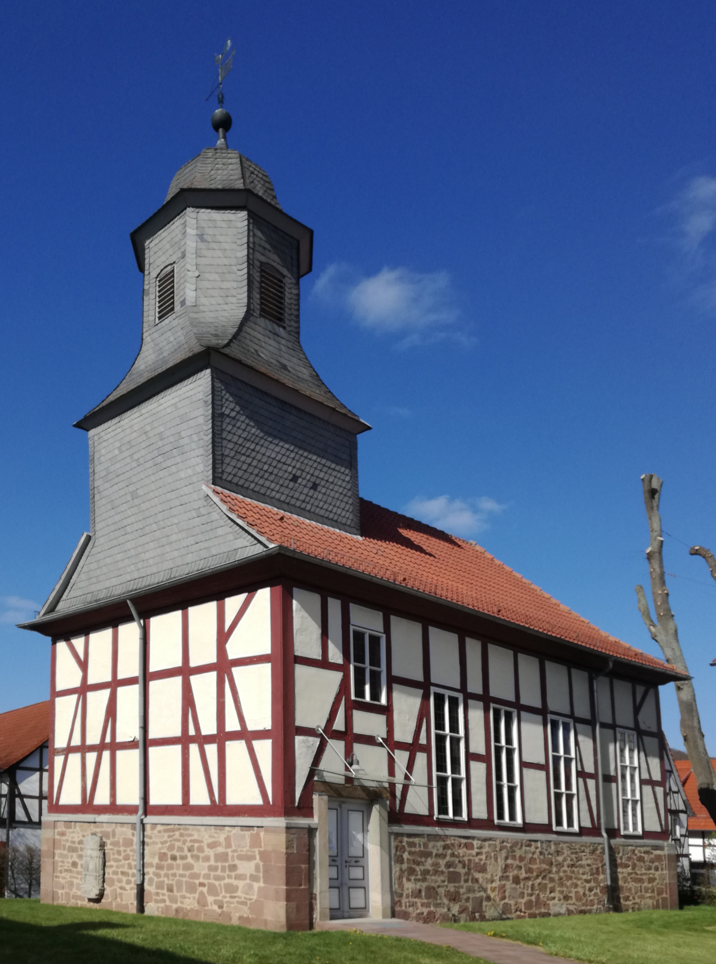 Turmseite